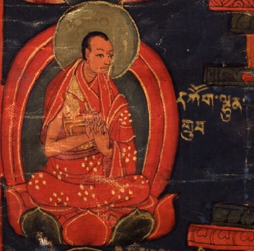 Konchok Lhundrub, b.1497 - d.1557, Tenth Ngor Khenchen